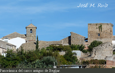 Casco antiguo Begíjar